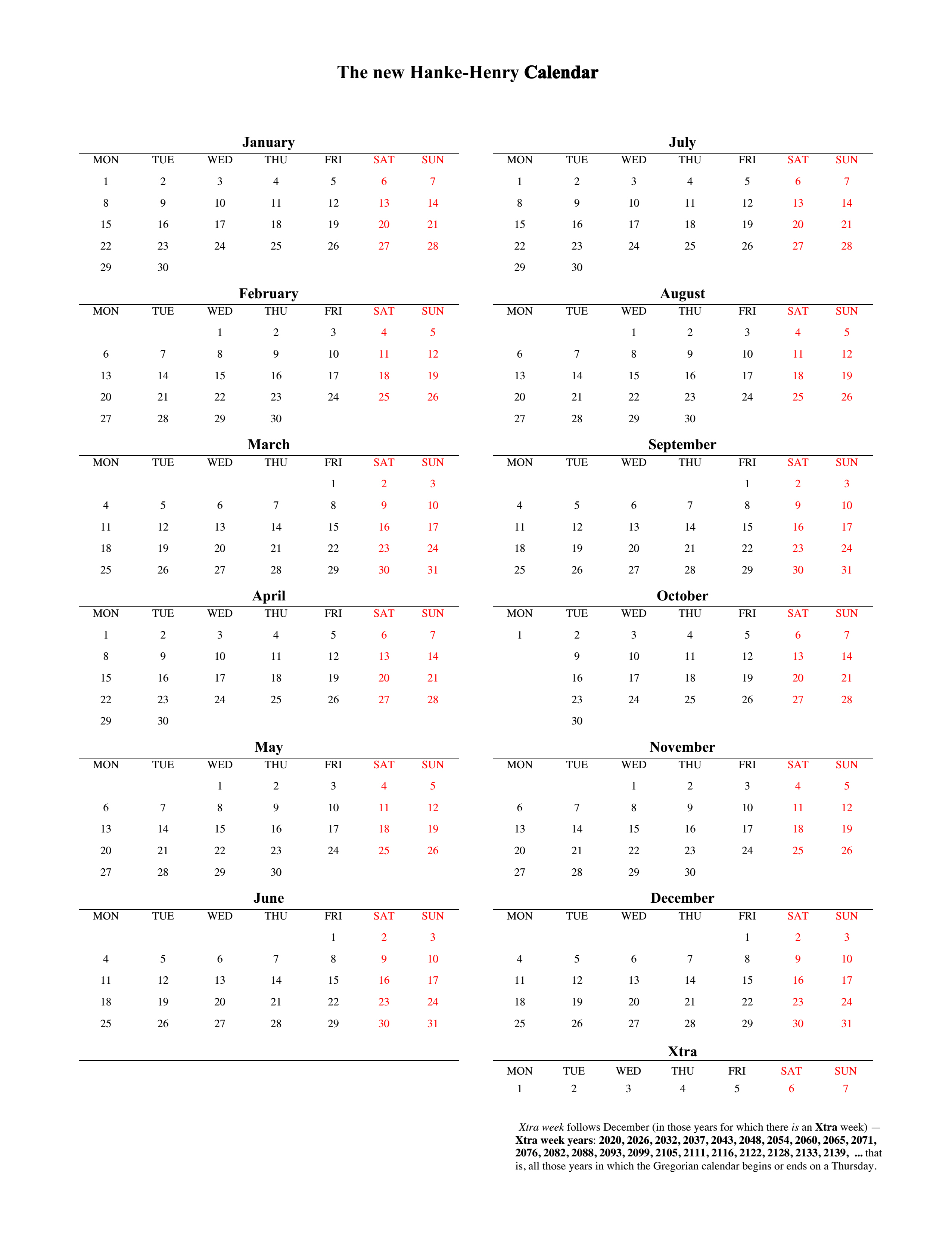 Hanke-Henry naptár